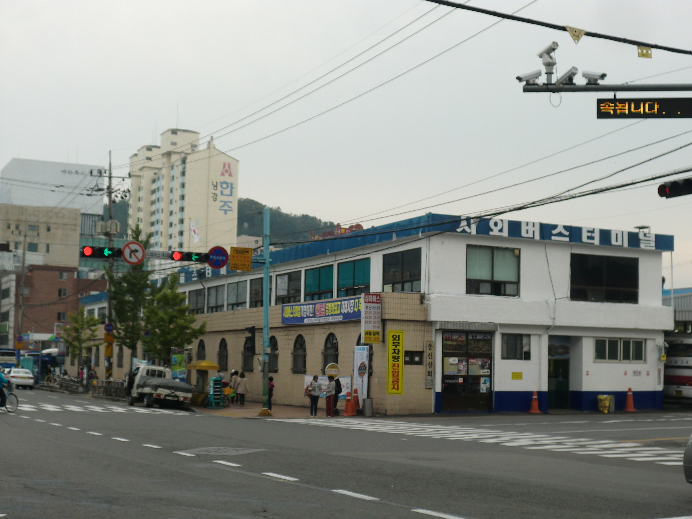 경상남도 진주시에 있는 진주시외버스터미널